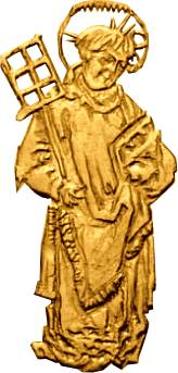 Der Entwurf zu dem heiligen St. Laurentius auf dem Goldgulden (Literatur: Kellner 10) entstand unter Mitwirkung Albrecht Dürers. Geprägt hat der verantwortliche Münzmeister Dietherr.